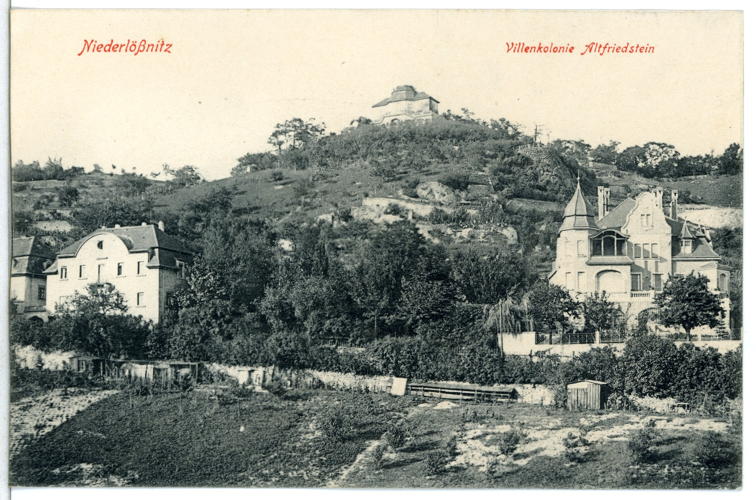 Radebeul; Villen - Kolonie Altfriedstein This postcard is from publisher Brück & Sohn in Meißen ( postcard has a unique number 12811 and is available in a higher resolution at the publisher. This images was uploaded in a cooperation project between Wikipedians and the publisher.